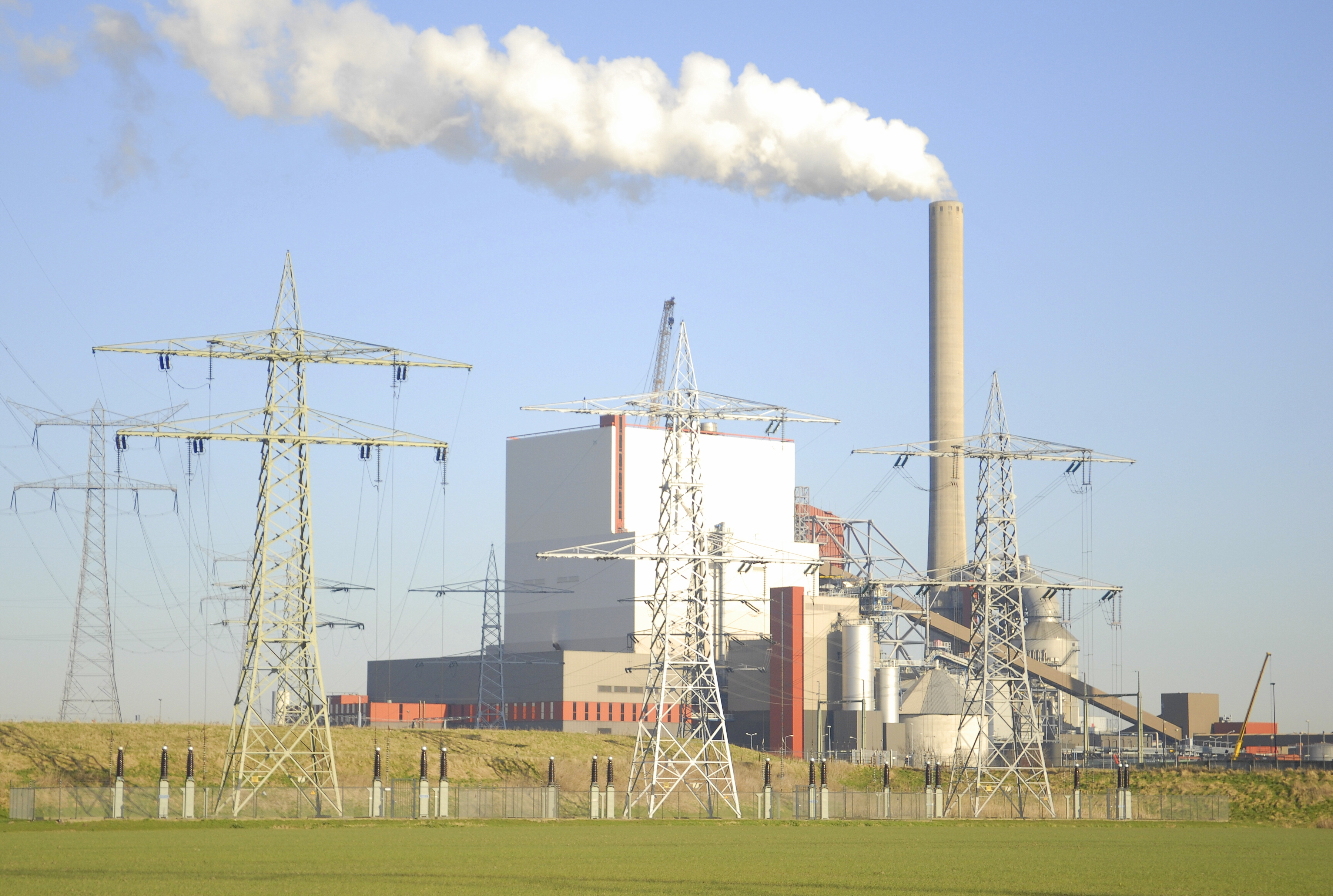 De Amercentrale van Essent in Geertruidenberg. Foto: Essent; Castel Communicatie